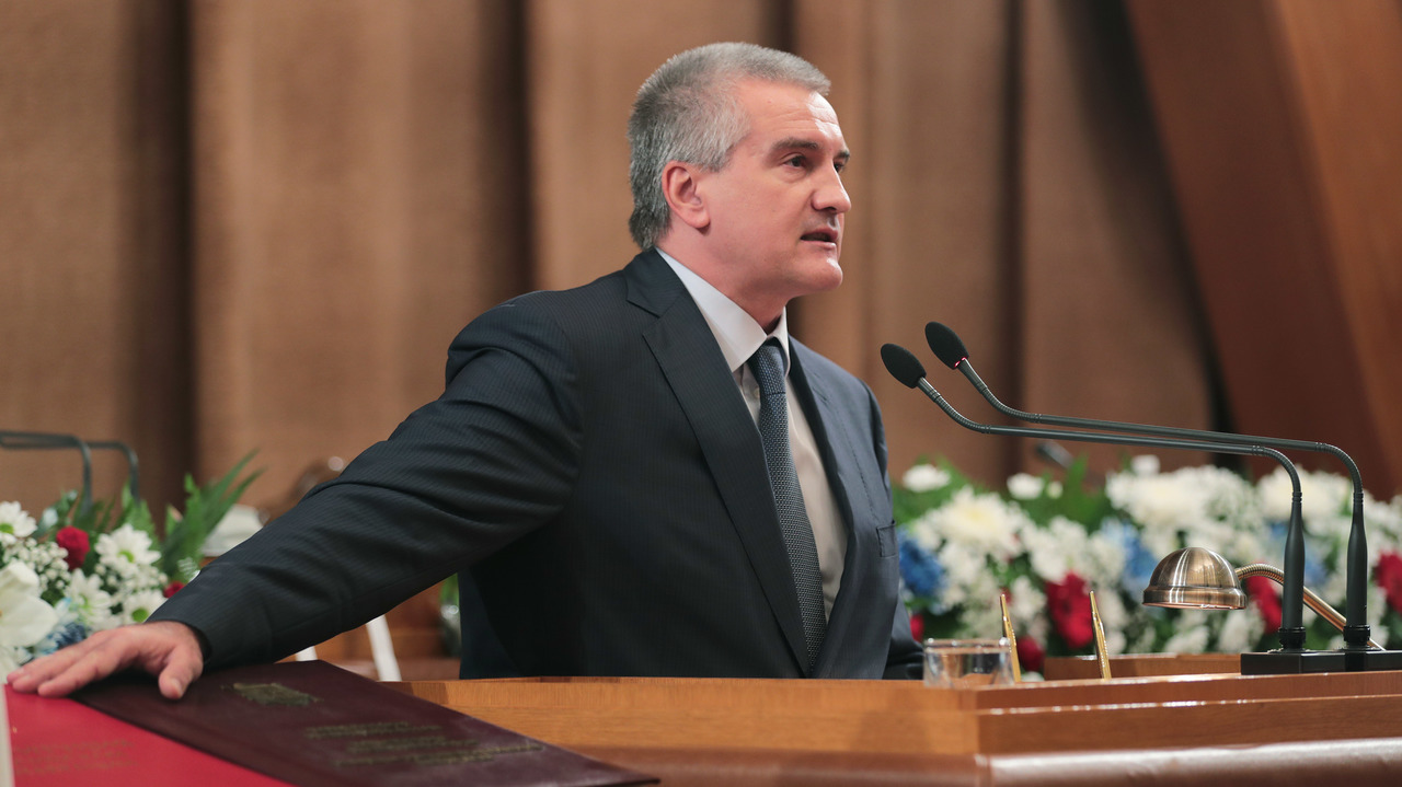 Инаугурация главы Республики Крым С.В. Аксёнова 20 сентября 2019 года